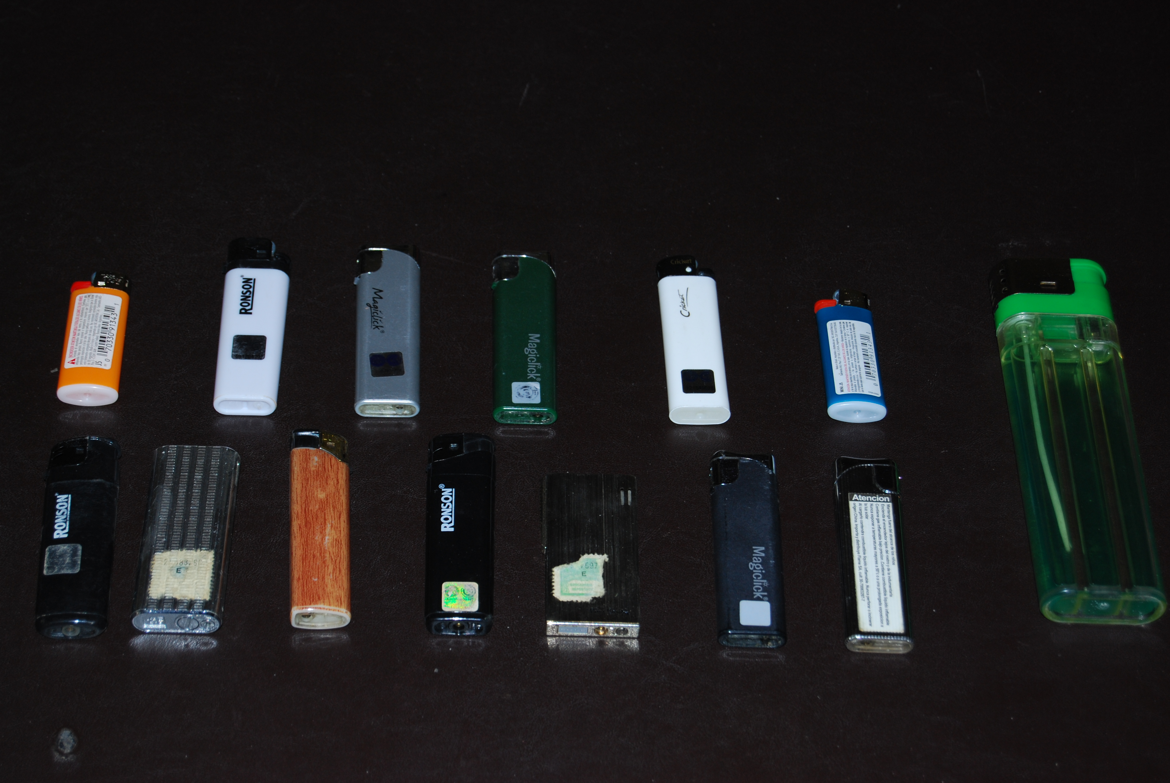 Distintos tipos de encendedor a gas de butano.